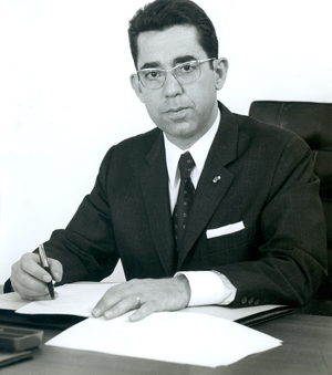 Mansour Moalla jeune inspecteur des finances.